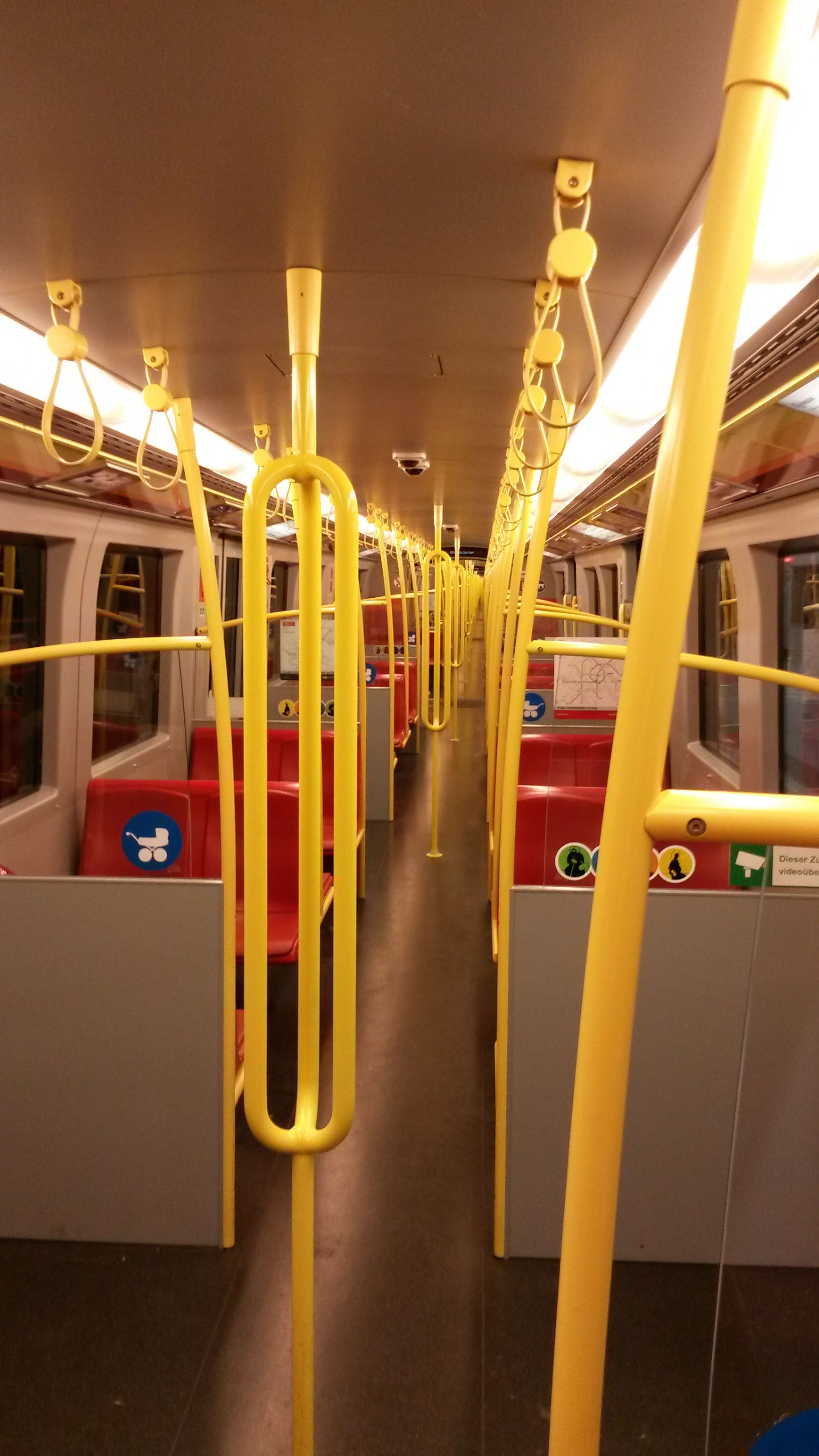 Haltegriff in der U3 in Wien